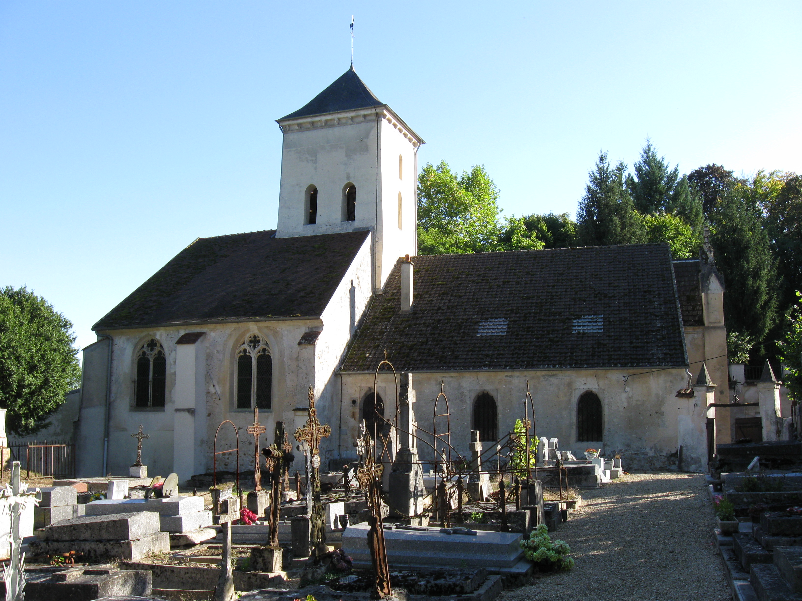 Église catholique Saint-Germain-Saint-Leu de Luzancy (Seine-et-Marne, région Île-de-France)